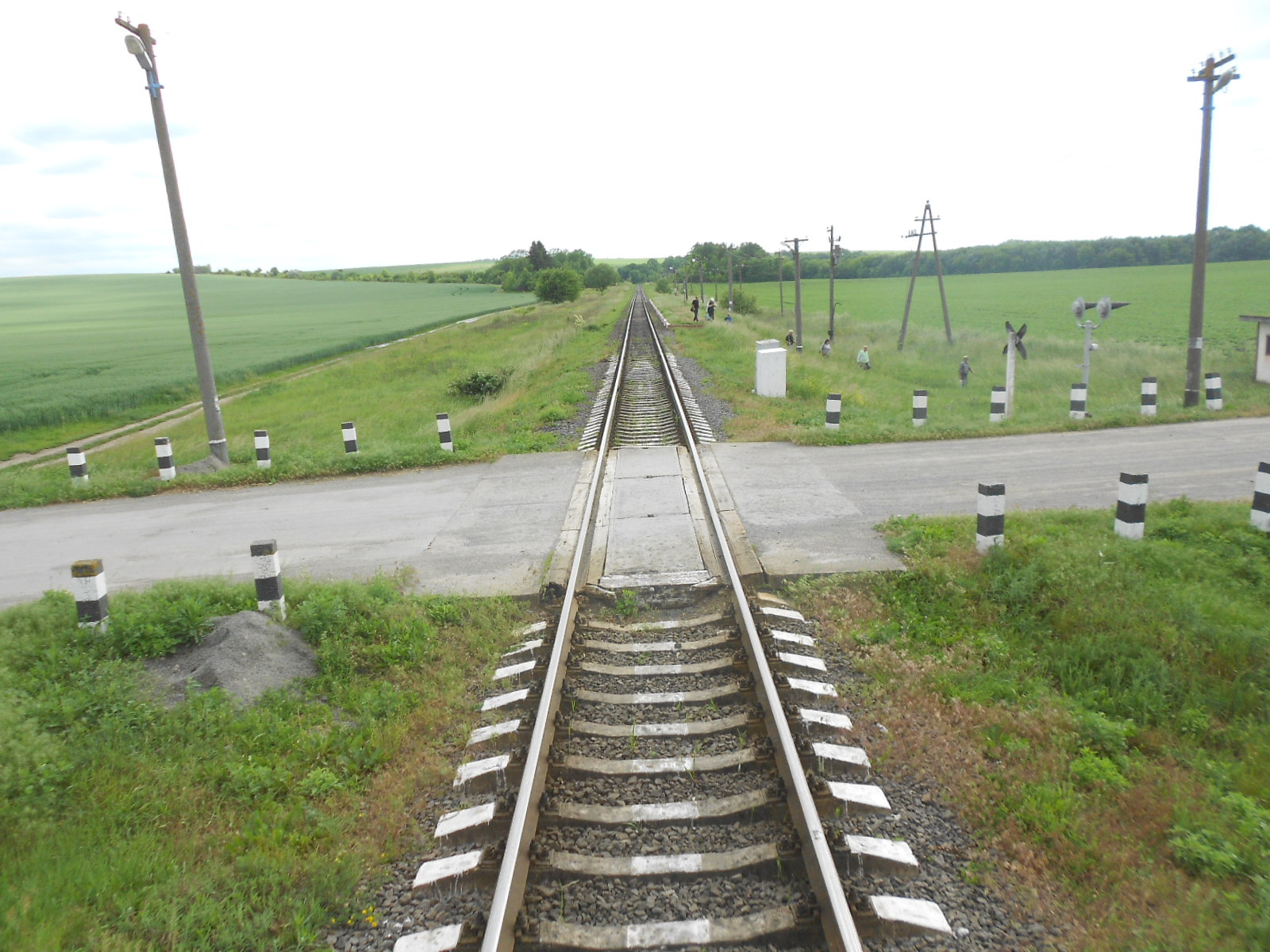 Зупинний пункт Заруддя